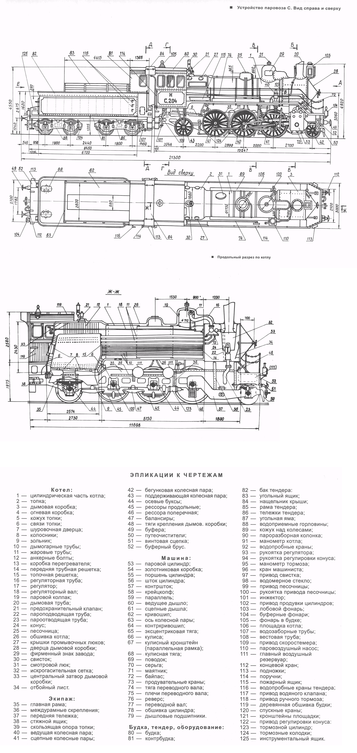 Схема российского паровоза серии "С" Схема российского паровоза серии "С", выпускавшегося в 1910-1918гг.